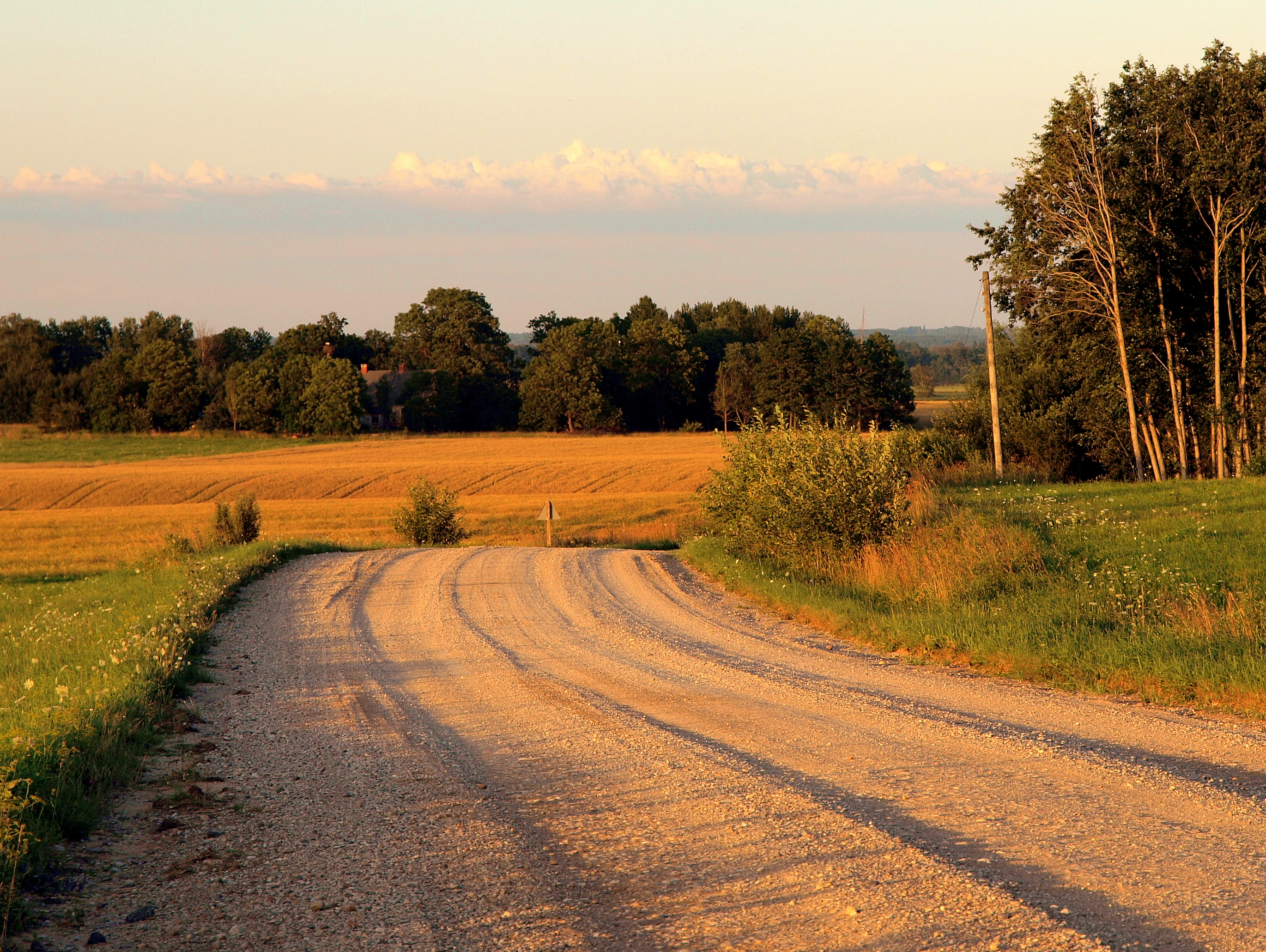 Evening road